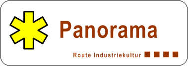 Infosymbole Panoramen der Route der Industriekultur